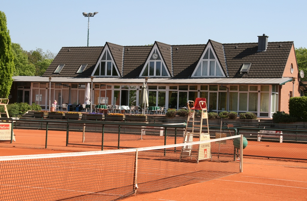 Clubhaus Club Raffelberg CR von der Tennisseite im Hochsommer